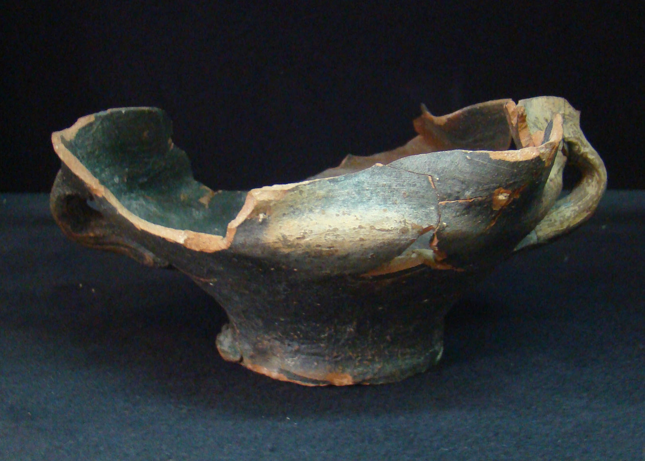 Pieza encontrada en el sitio arqueológico de la calle de Alcalleres en Valladolid (España) en el transcurso de unas obras en esa misma calle.